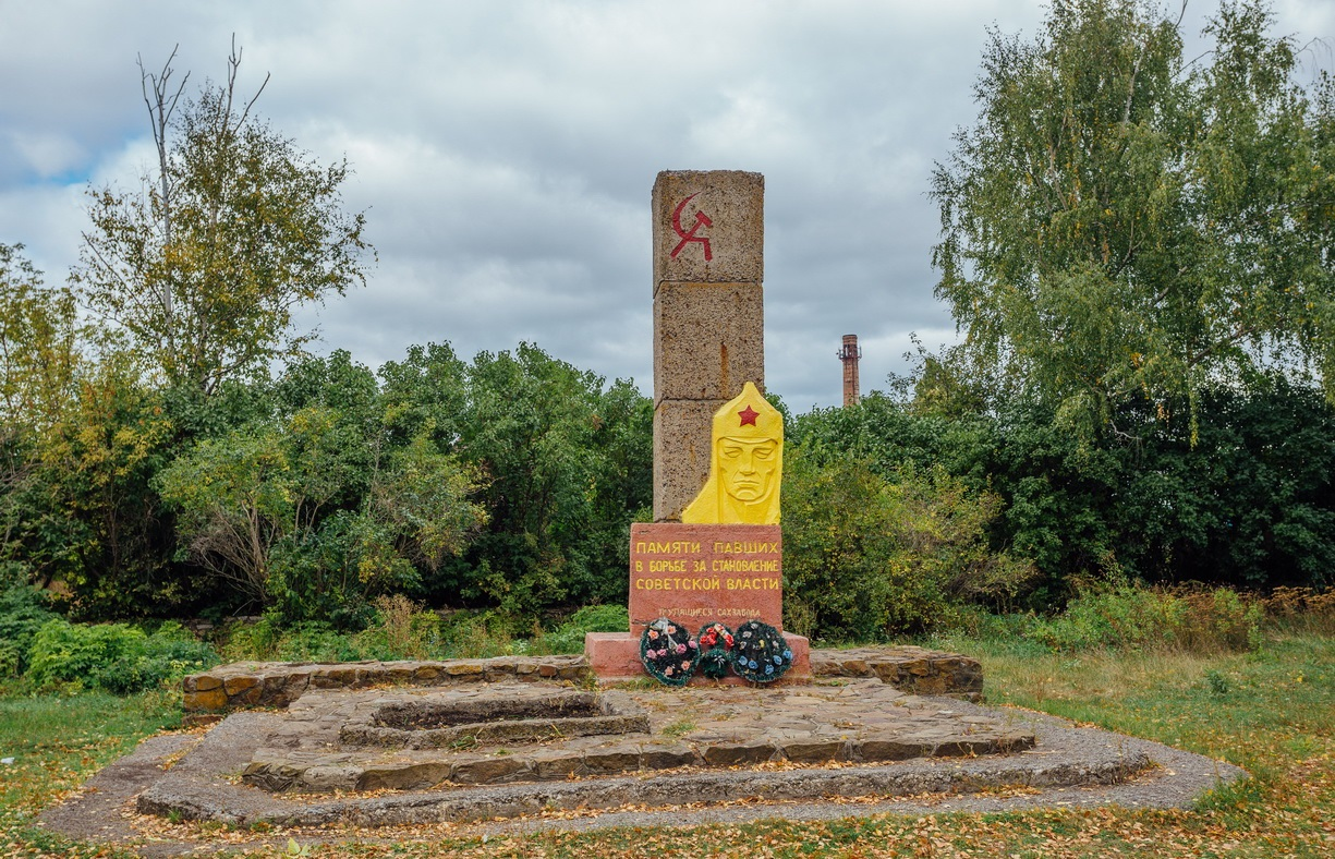 Памятник в Новопокровке